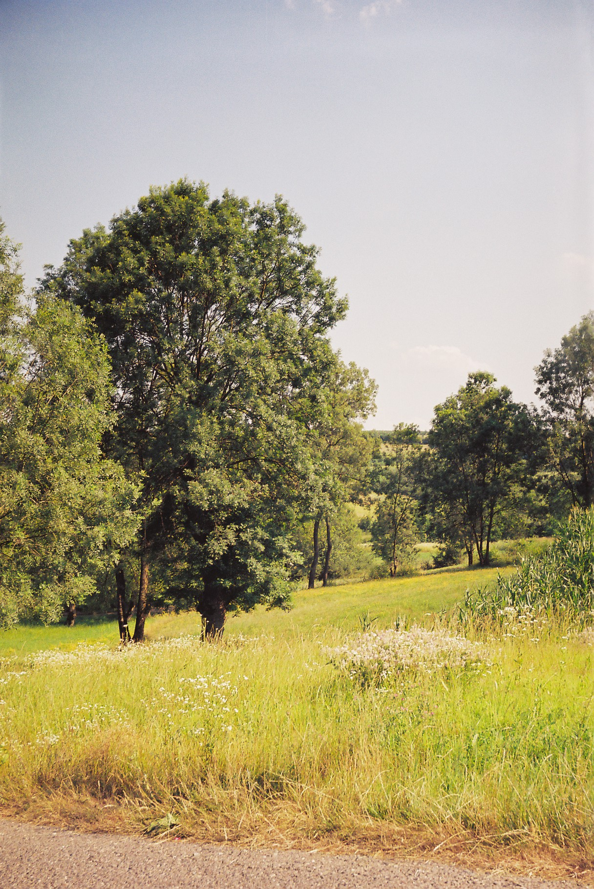 Đurić S Marko